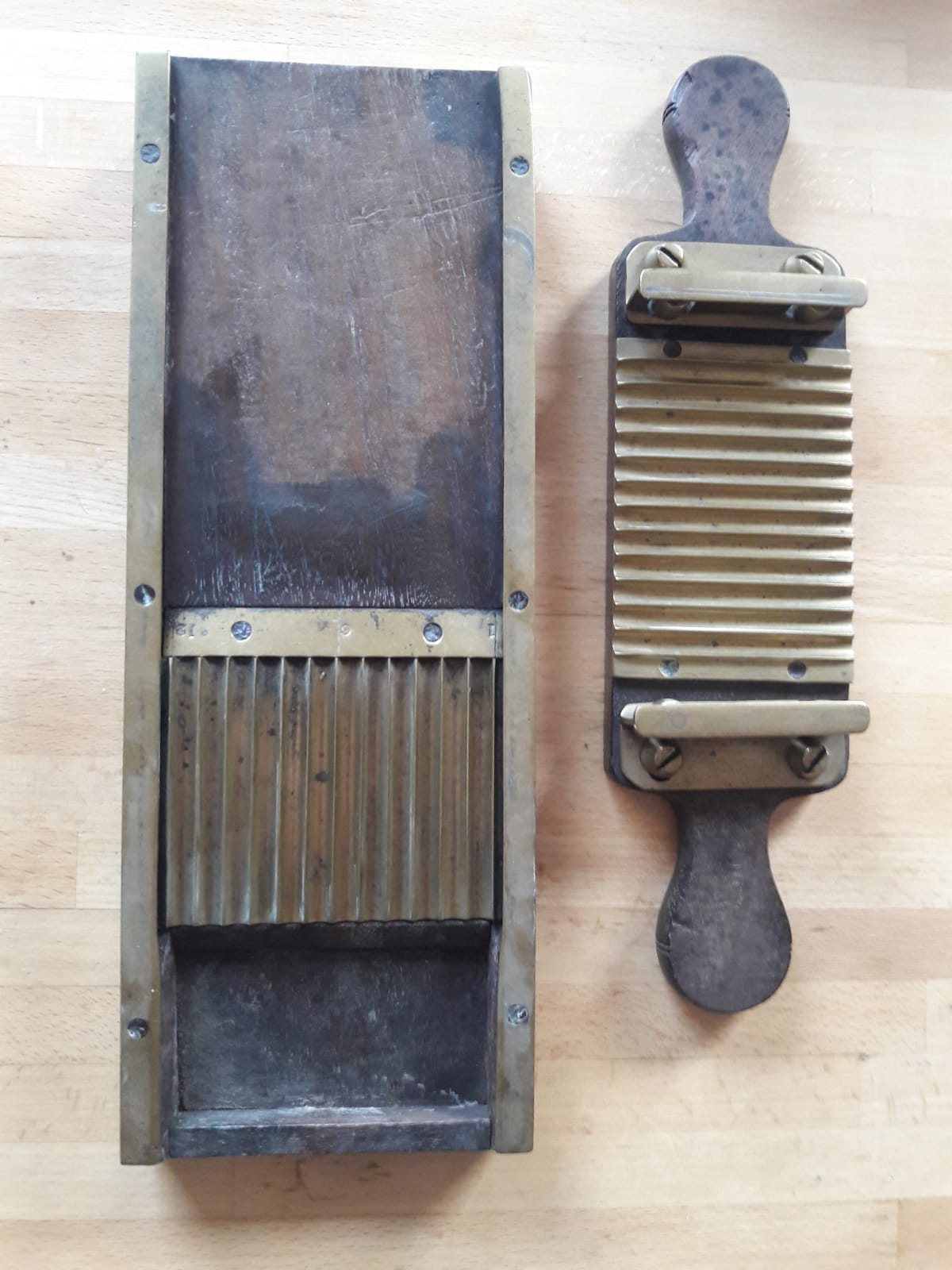 Pillenplank gebruikt door apotheek Groen te Aalsmeer